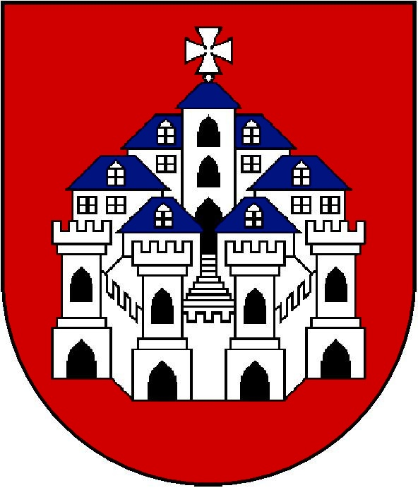 Brasao da Família Antunes